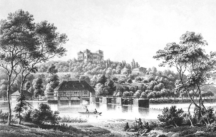 Neckarwehr Berg und Villa Berg bei Stuttgart. Nach der Natur gezeichnet und lithographiert von E. Emminger.